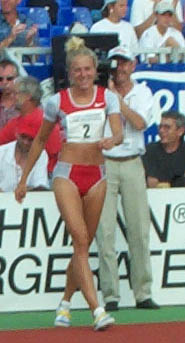 Kajsa Bergqvist nach ihrem 2,06-Sprung von Eberstadt 2003, selbst fotografiert und zur Nutzung freigegeben